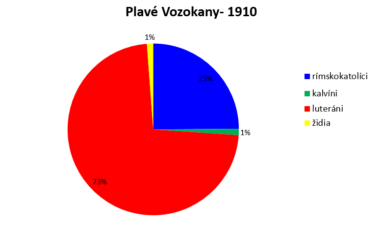 náboženské zloženie